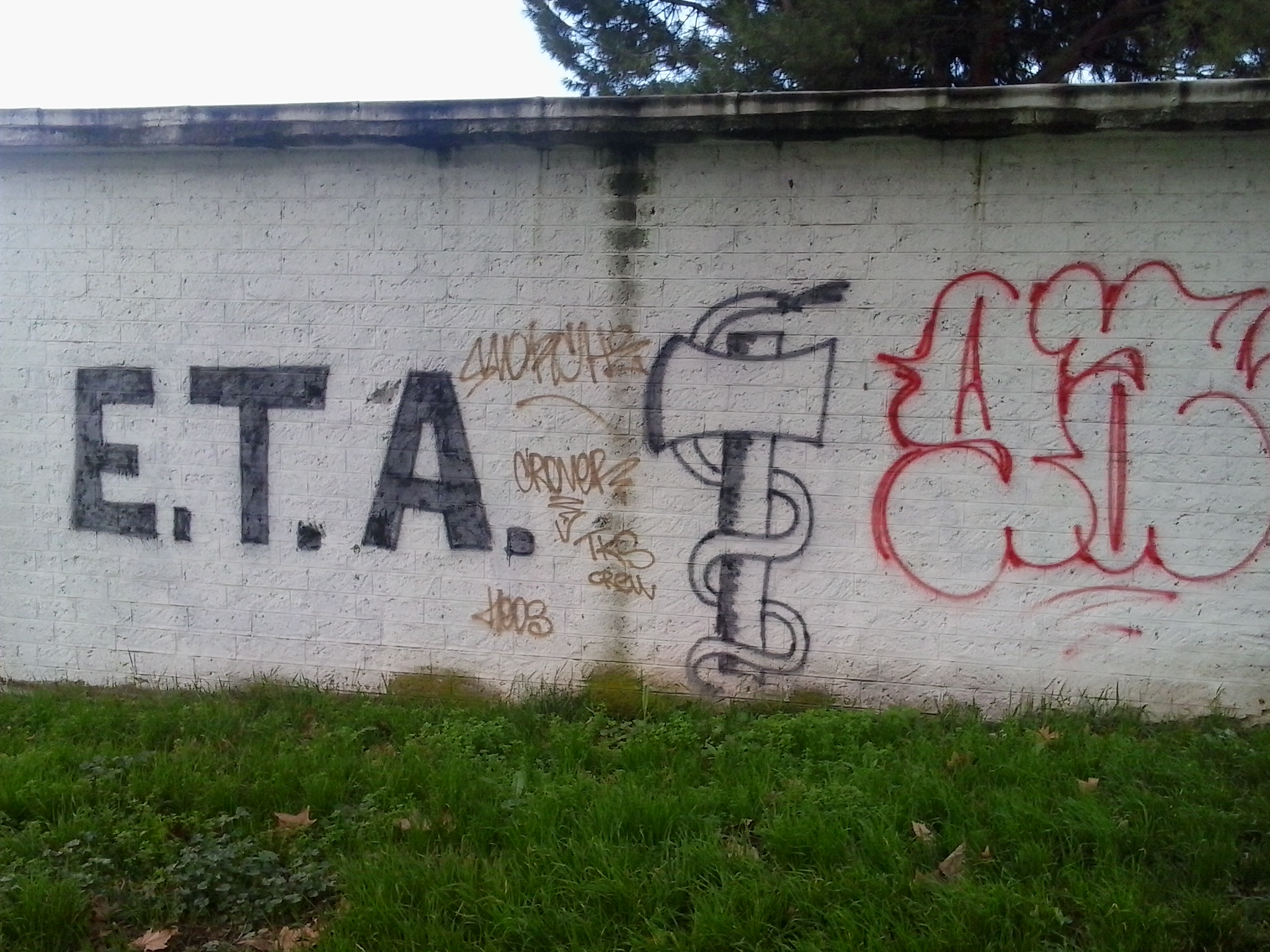 Graffiti in Tor Sapienza